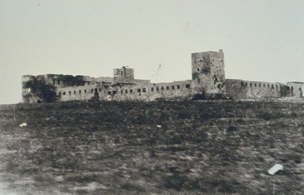 משטרת עירק-סועידן או מצודת עיראק-סואידן